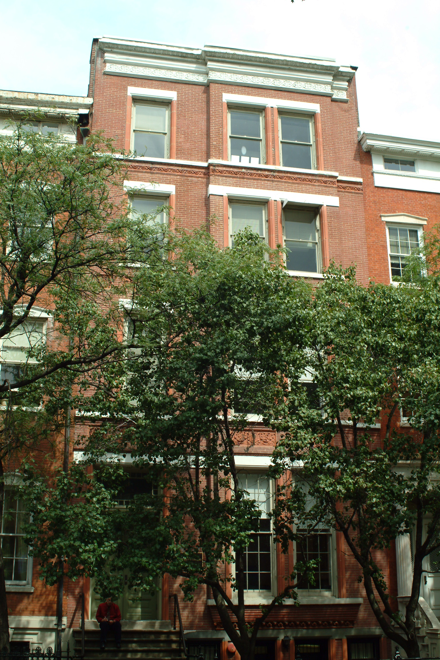 Wohnung von Edward Hopper, 3 Washington Square North, New York City